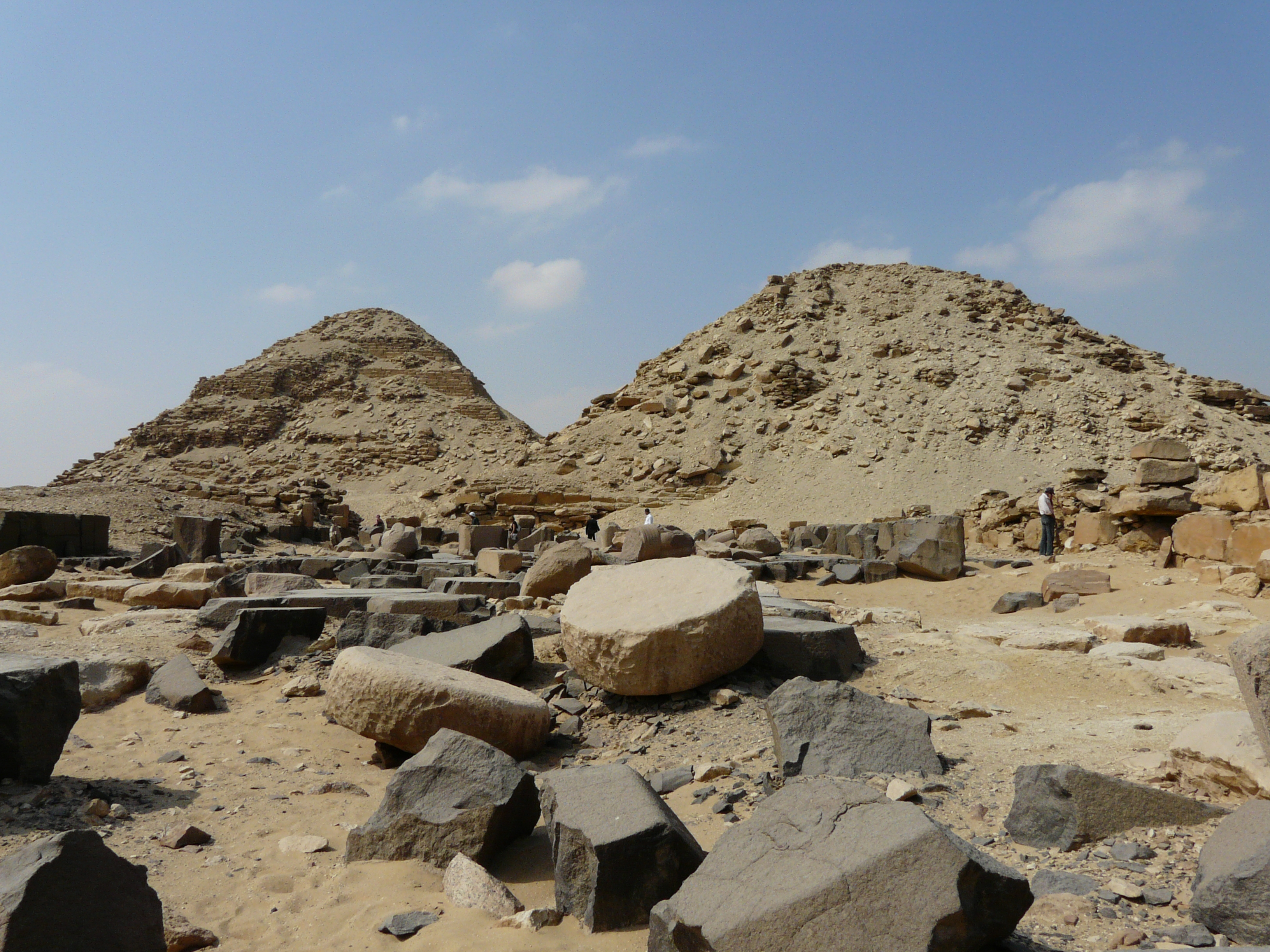 Temple et pyramide du complexe funéraire de Niouserrê (Ve dynastie) - Au second plan, pyramide de Neferirkarê - Site d'Abousir